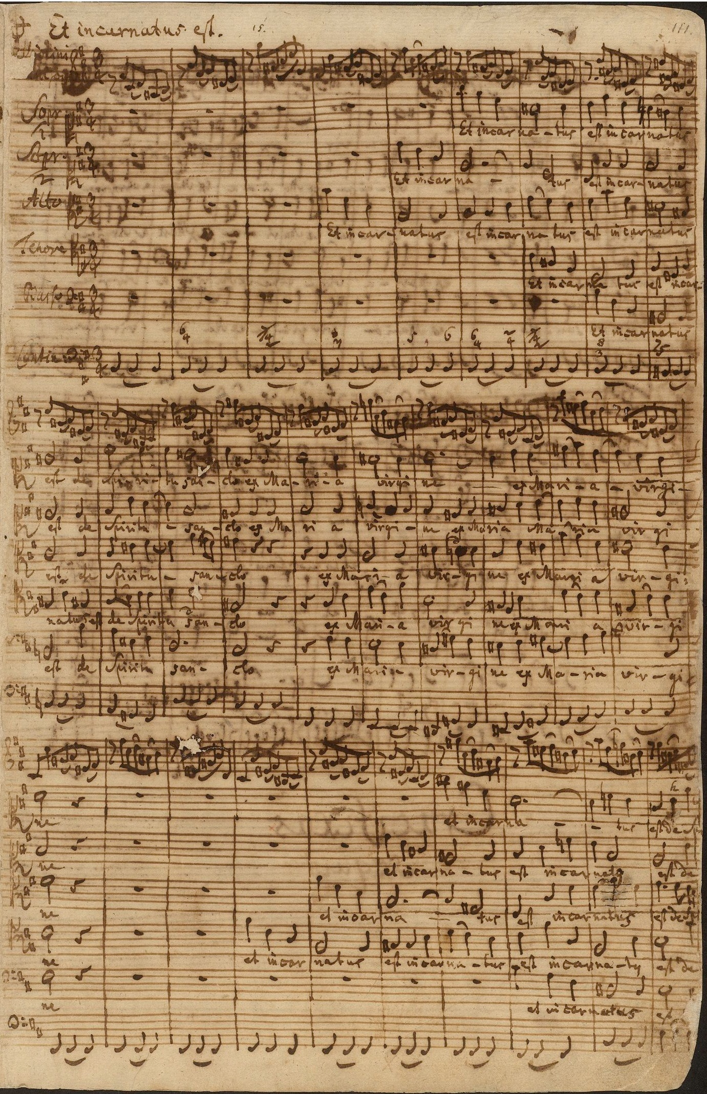 Johann Sebastian Bach, Messe in h-Moll BWV 232, Autograph des Et incarnatus est aus dem Credo